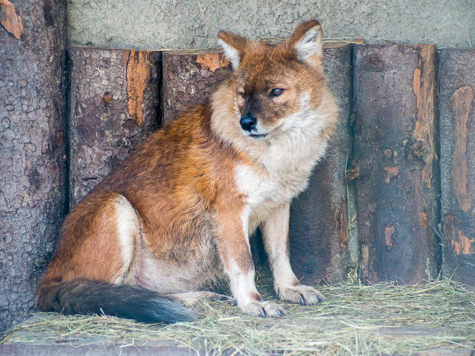 Красный волк в Московском зоопарке